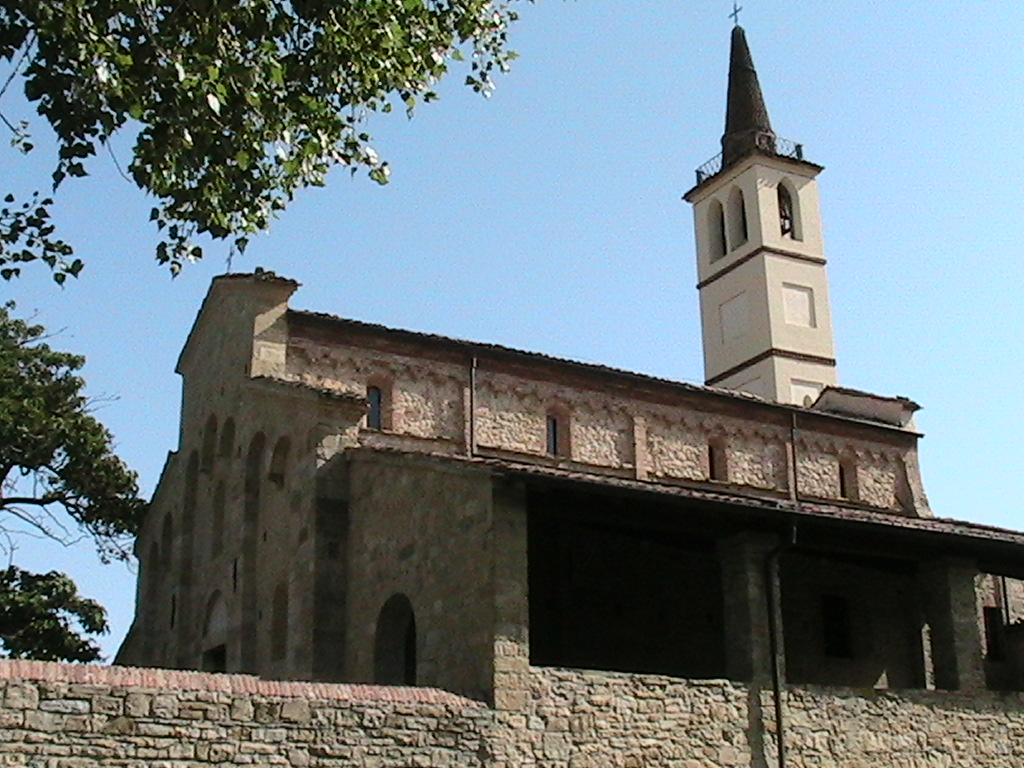 Careno (Pellegrino Parmense) - Santuario della Beata Vergine Assunta